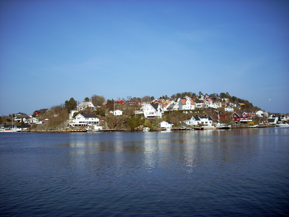 Eydehavn, Arendal. Bildet er tatt mot nord.